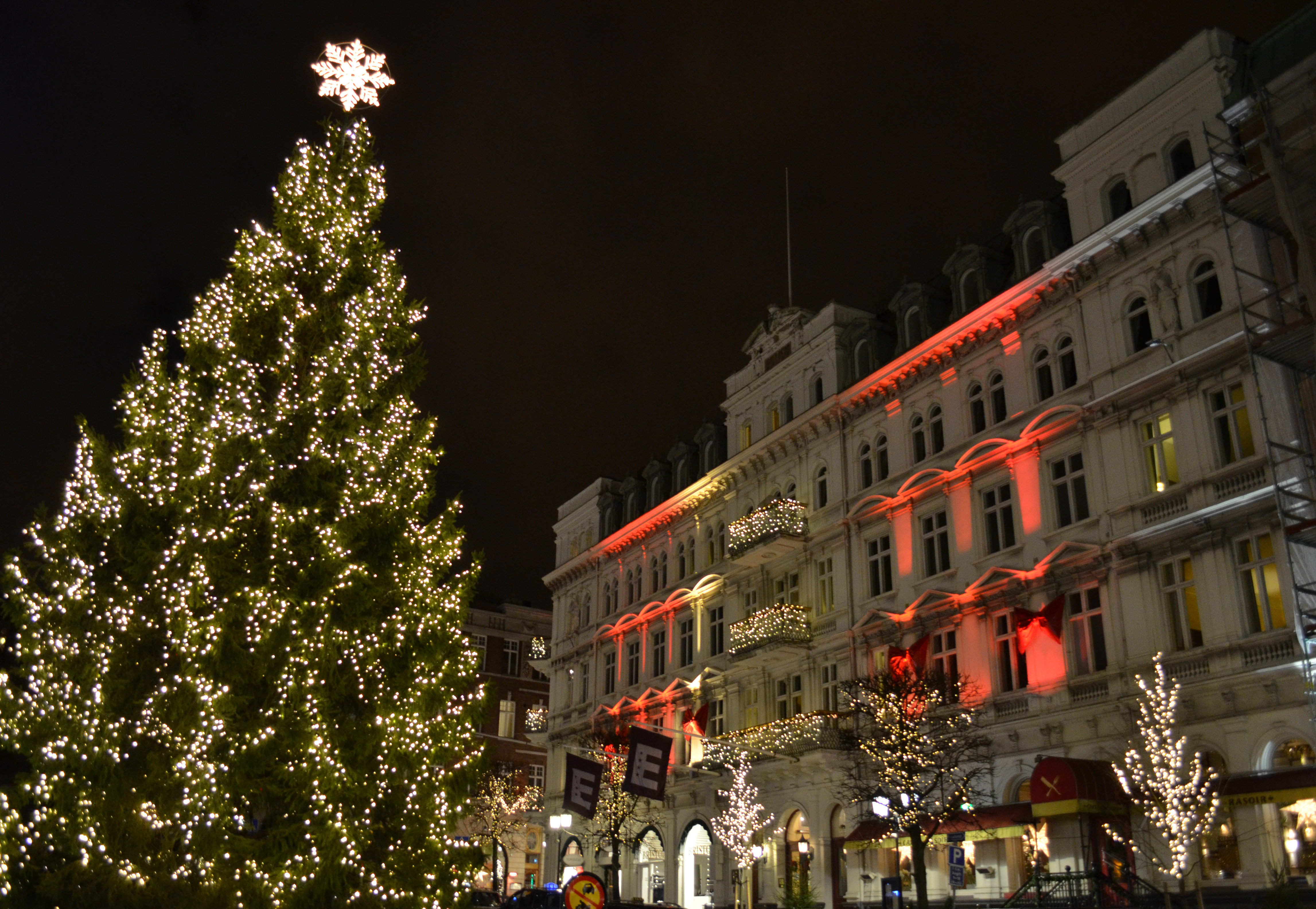 Julgranen på Stortorget i Helsingborg och Hotell Mollberg.